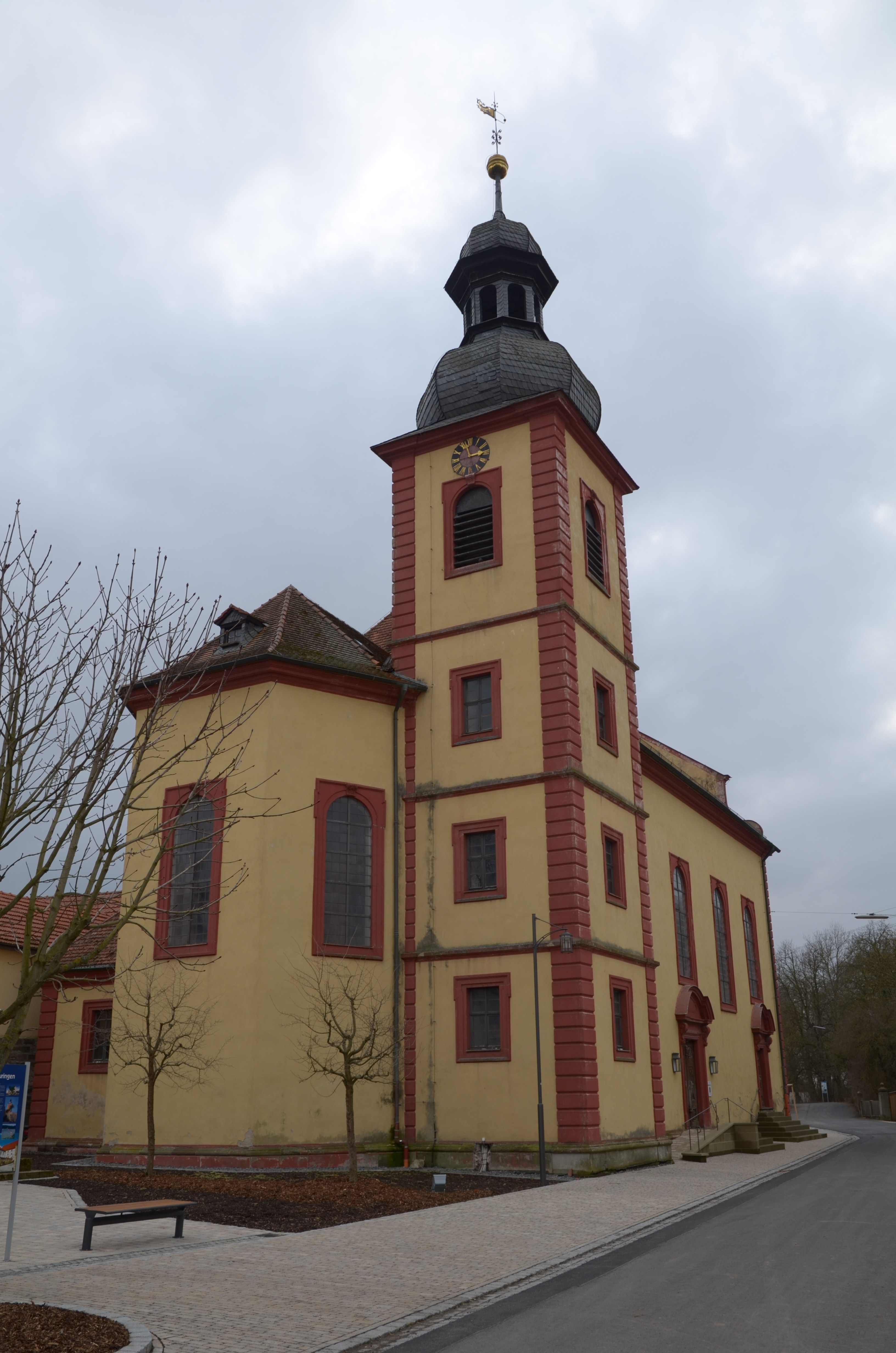 evang.-luth. Martinskirche in Wetzhausen